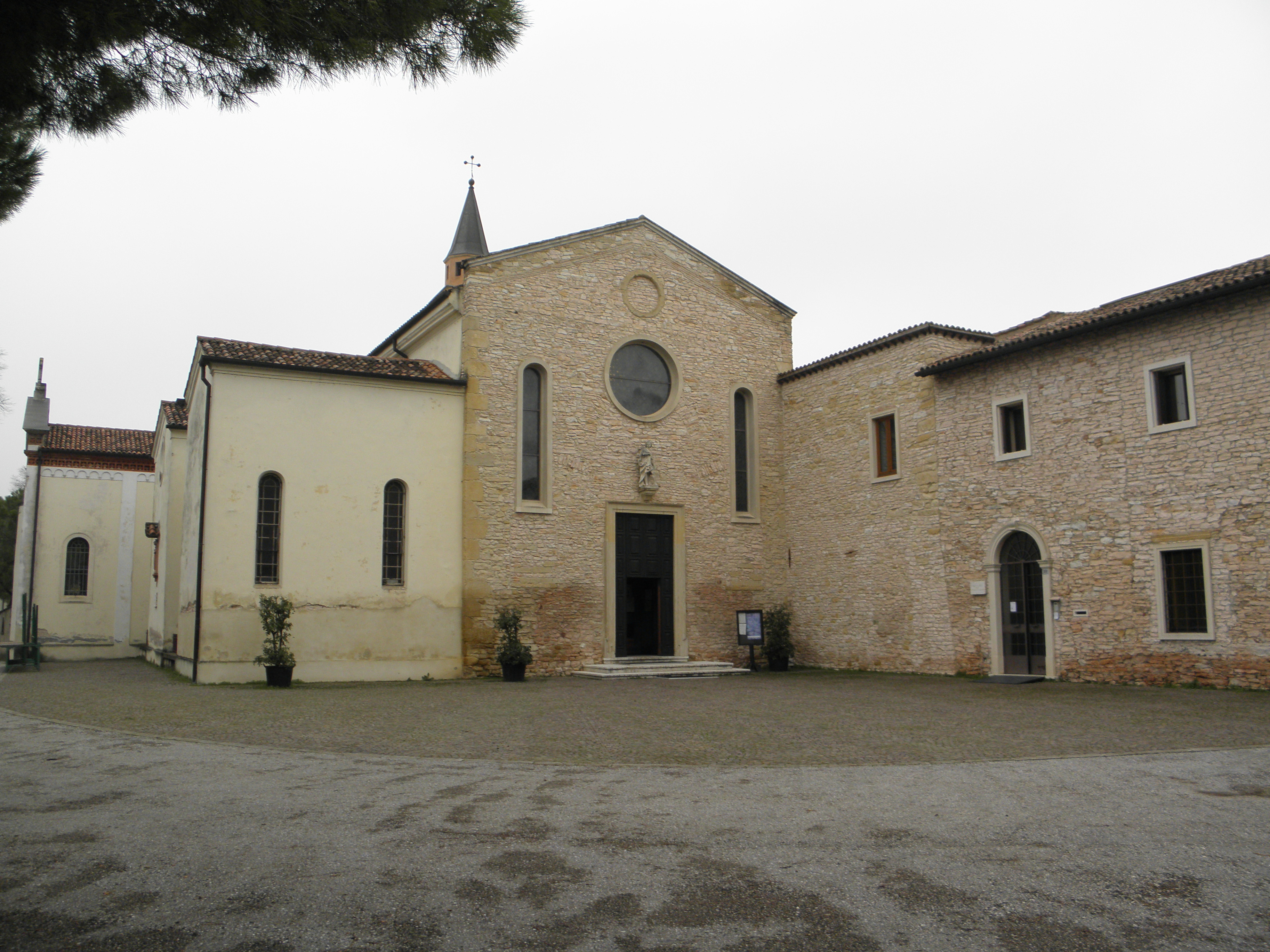 Convento francescano di San Pancrazio, originario del 1501, sito sull'omonimo colle nei pressi di Barbarano Vicentino.